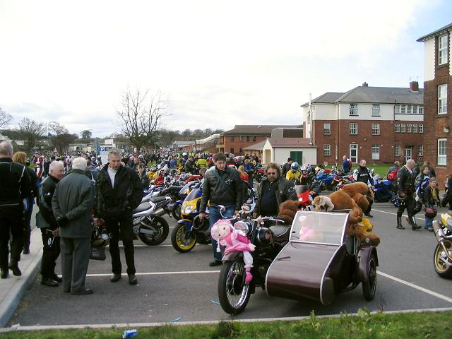 Wirral Egg Run, Clatterbridge Hospital 2004